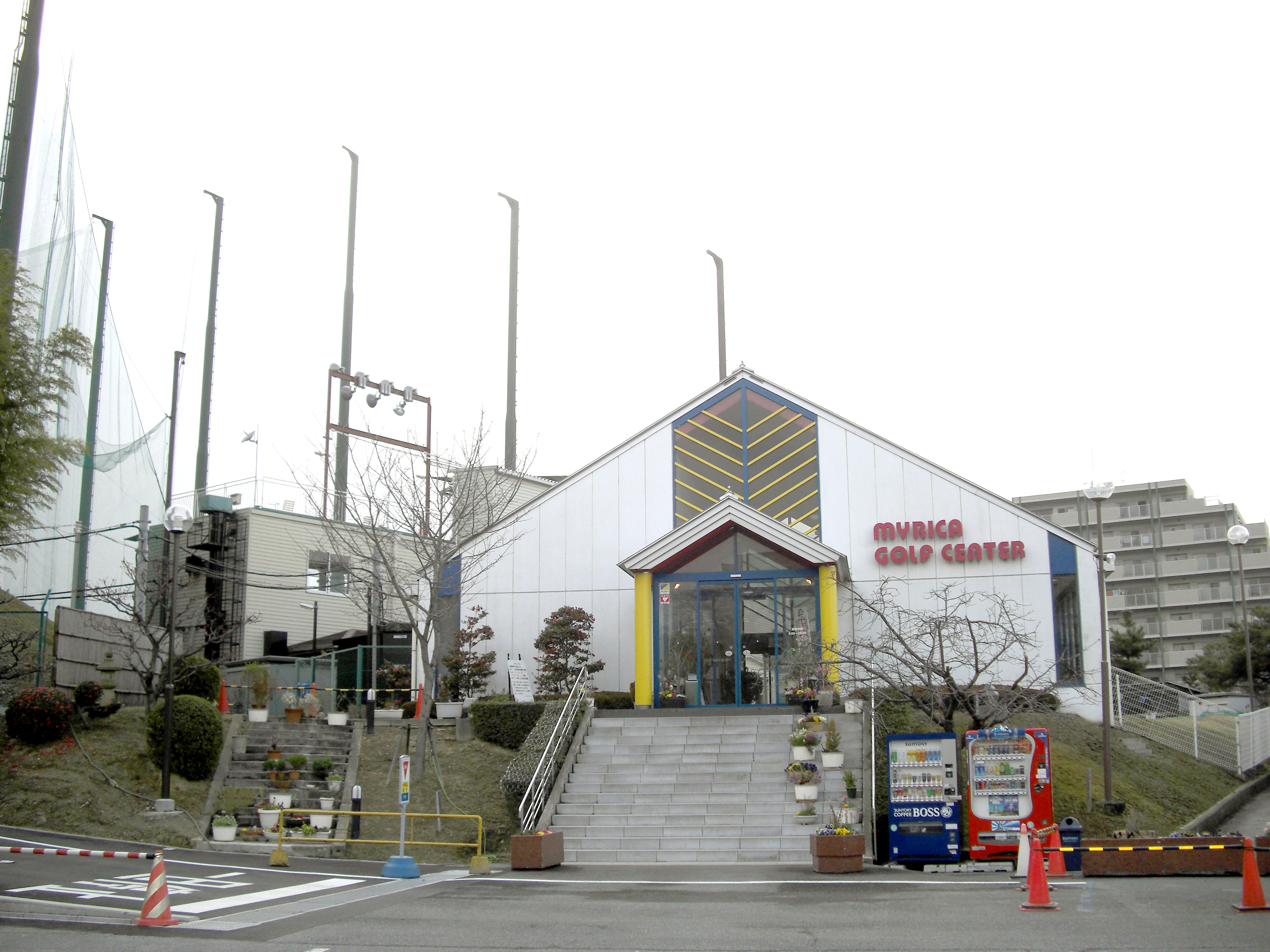 MYRICA GOLF CENTER,Senrioka-kita Suita-shi Osaka Japan.